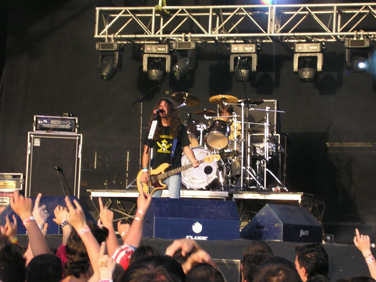 La Fuga durante el festival Viña Rock 2005La Fuga en Viña Rock 2005